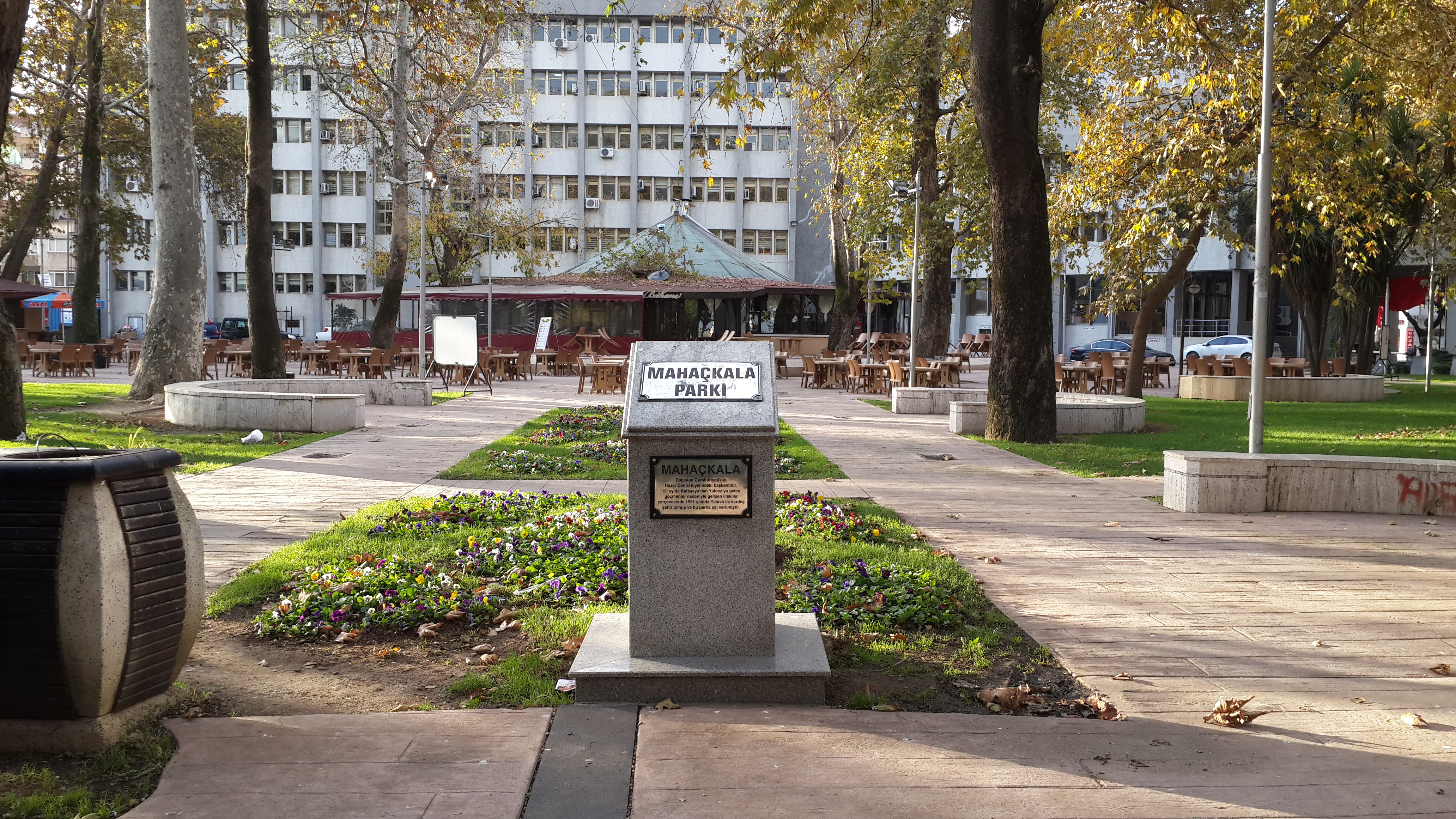 Dağıstan'ın başkenti Mahaçkale'den gelen göçmenler sonrası gelişen ülke ilişkilerine atıfla sayılan saygı heykeli, Yalova.